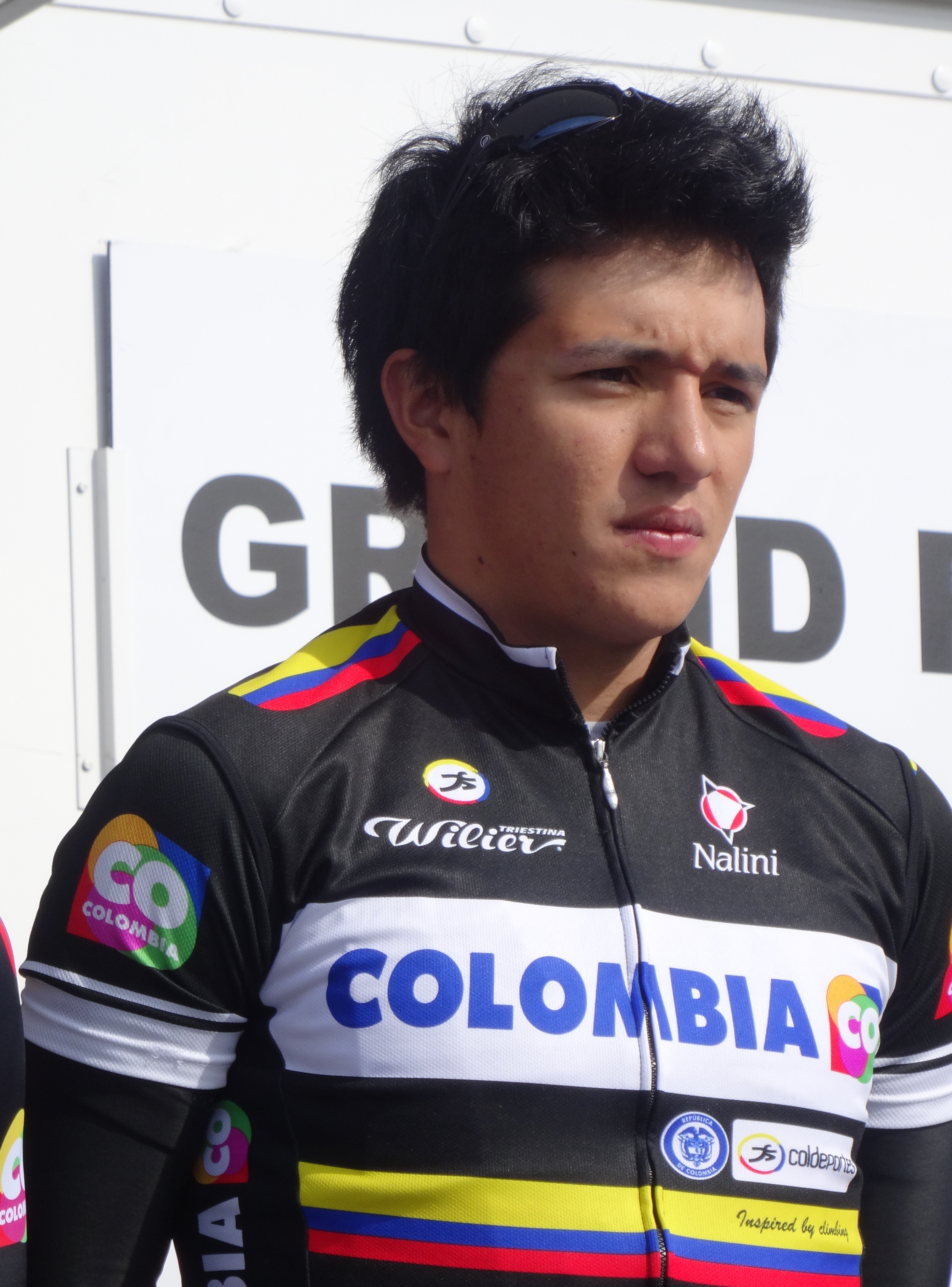 Reportage réalisé le jeudi 17 avril à l'occasion du départ et de l'arrivée du Grand Prix de Denain 2014 à Denain, Nord, Nord-Pas-de-Calais, France.